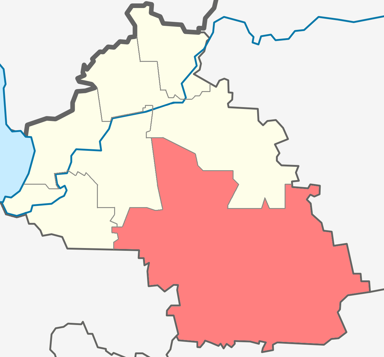 Алёховщинское СП на карте Лодейнопольского района